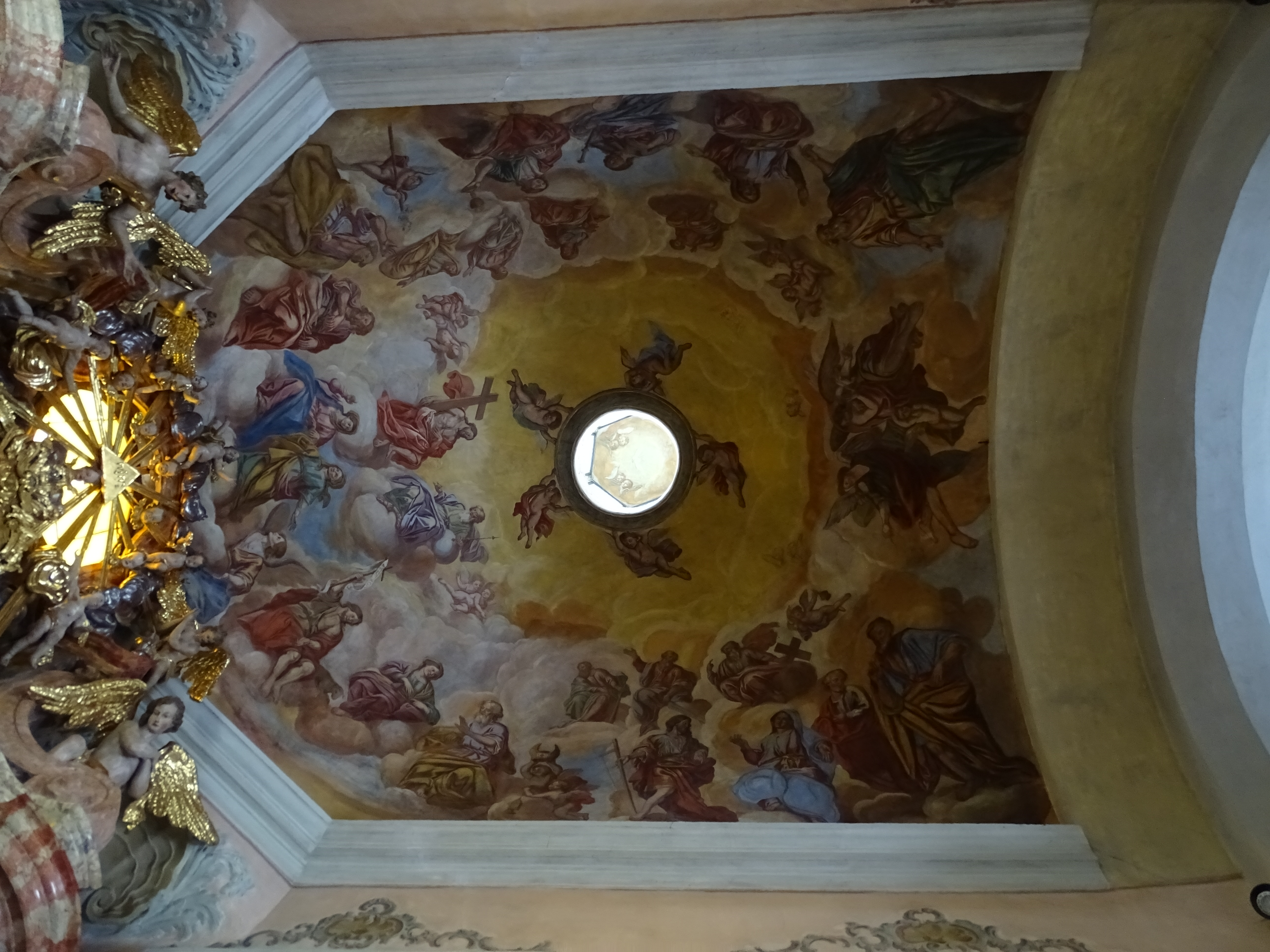 Das Gewölbefresko mit einer Darstellung der Heiligen Sippe in der Annenkapelle der Wallfahrtskirche Maria Straßengel. Es wurde um 1750 von Joseph Amonte geschaffen und zeigt die Heilige Sippe sowie die dreimalige Heirat der Mutter Anna, die sogenantne Trinubiumslegende.